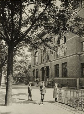 Turnhalle der Hamburger Turnerschaft von 1816 im Jahr 1901 Foto: Wilhelm Dreesen